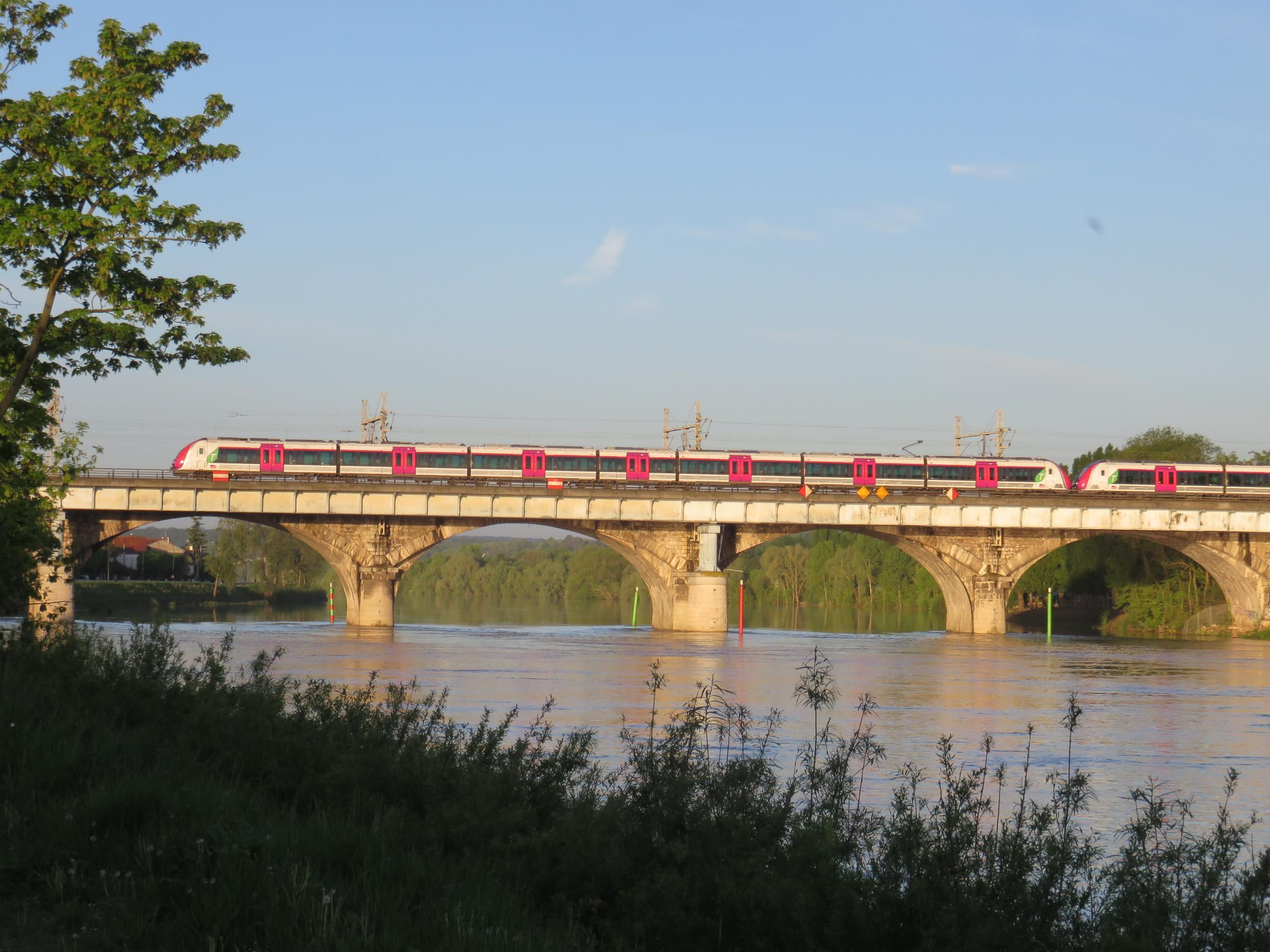 Pont SNCF de Maisons-Laffite partie Sud